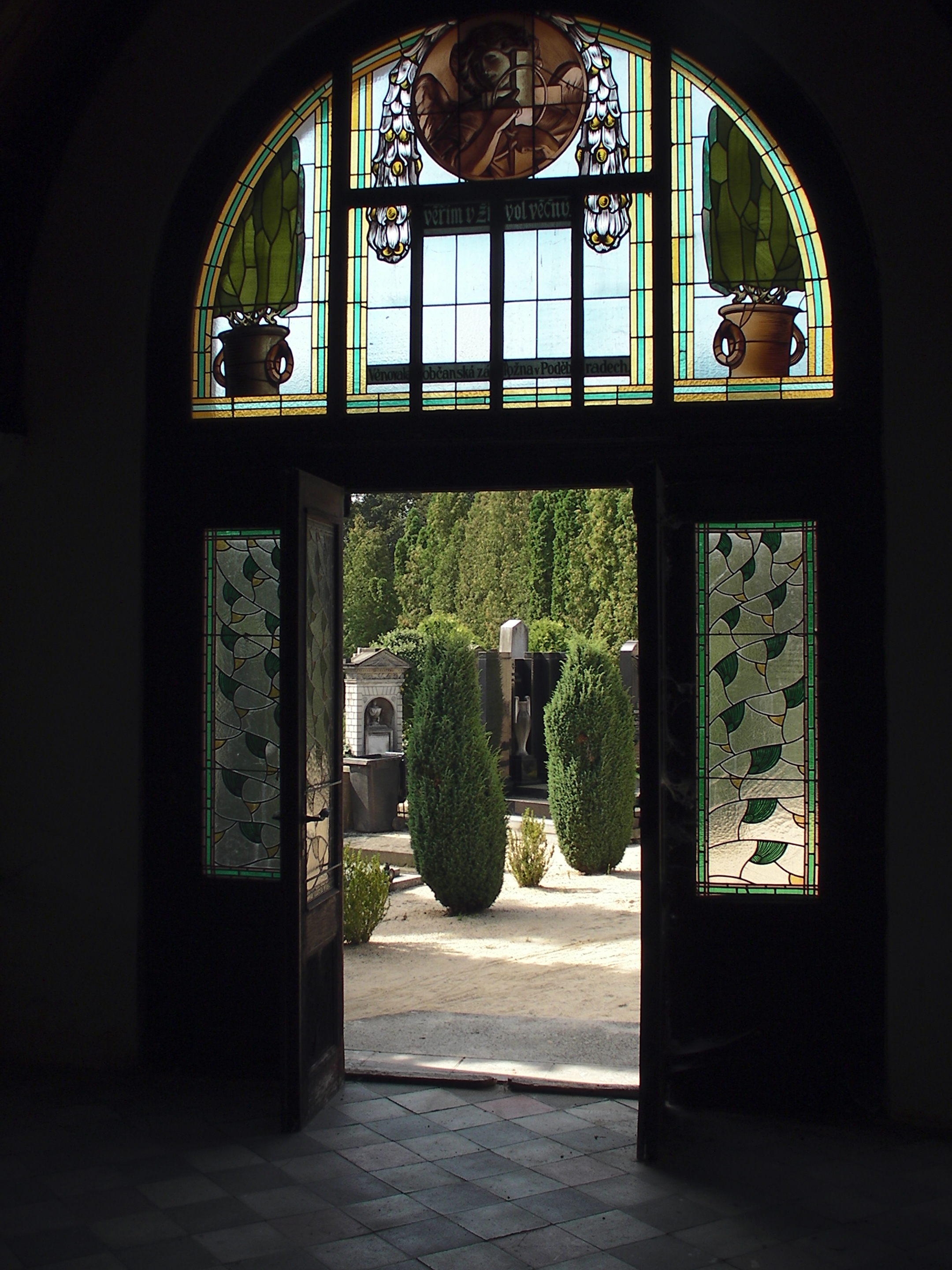 Hřbitov v Kluku. Interiér kaple.